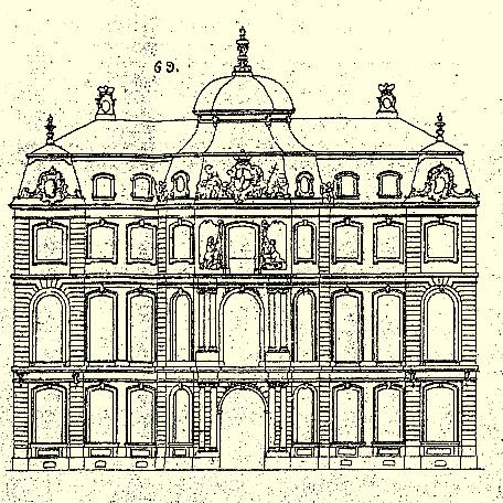 Entwurfsskizze zum Jagdschloss Prinzenhof in Maaseik von Johann Joseph Couven